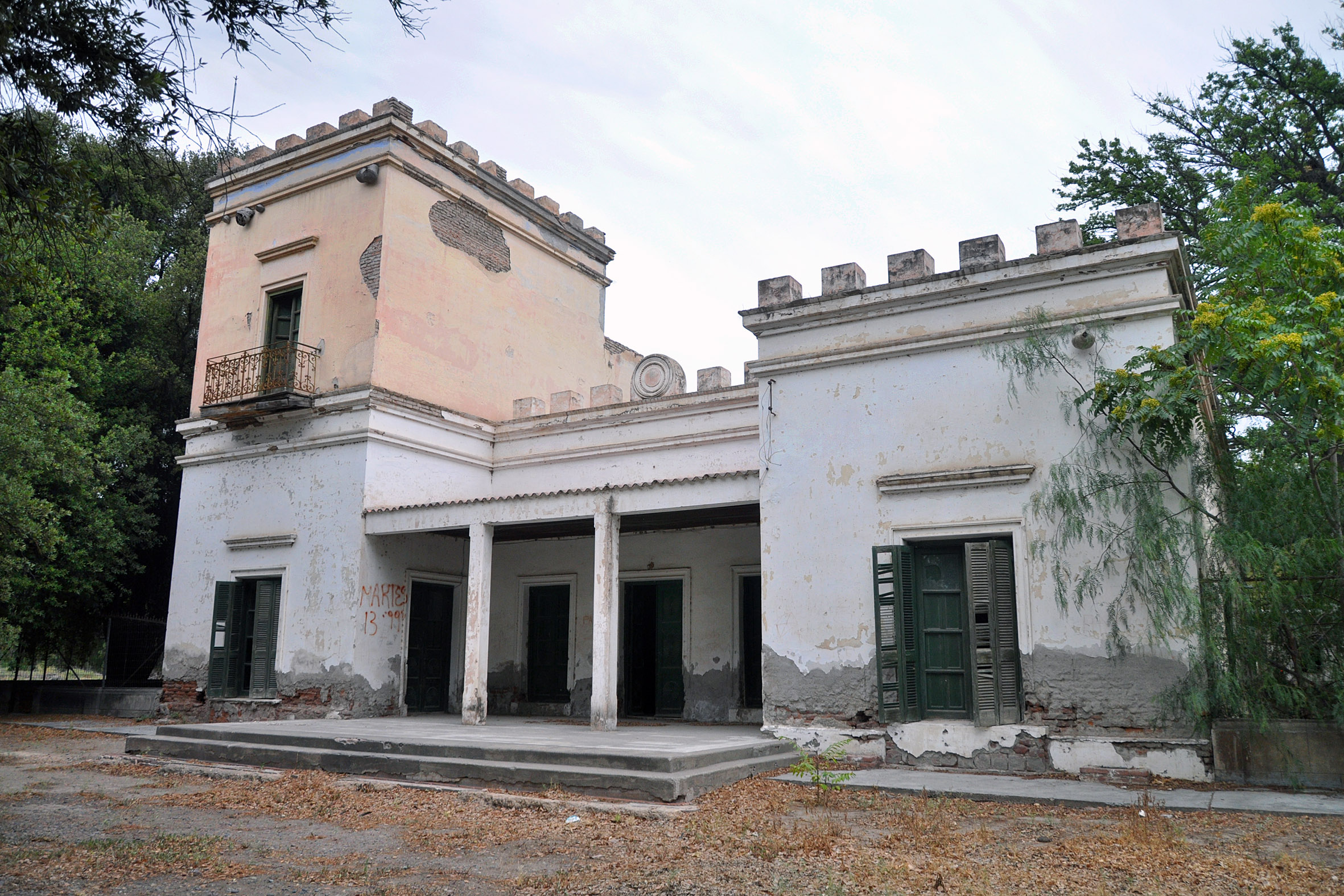 Fortín Belisle